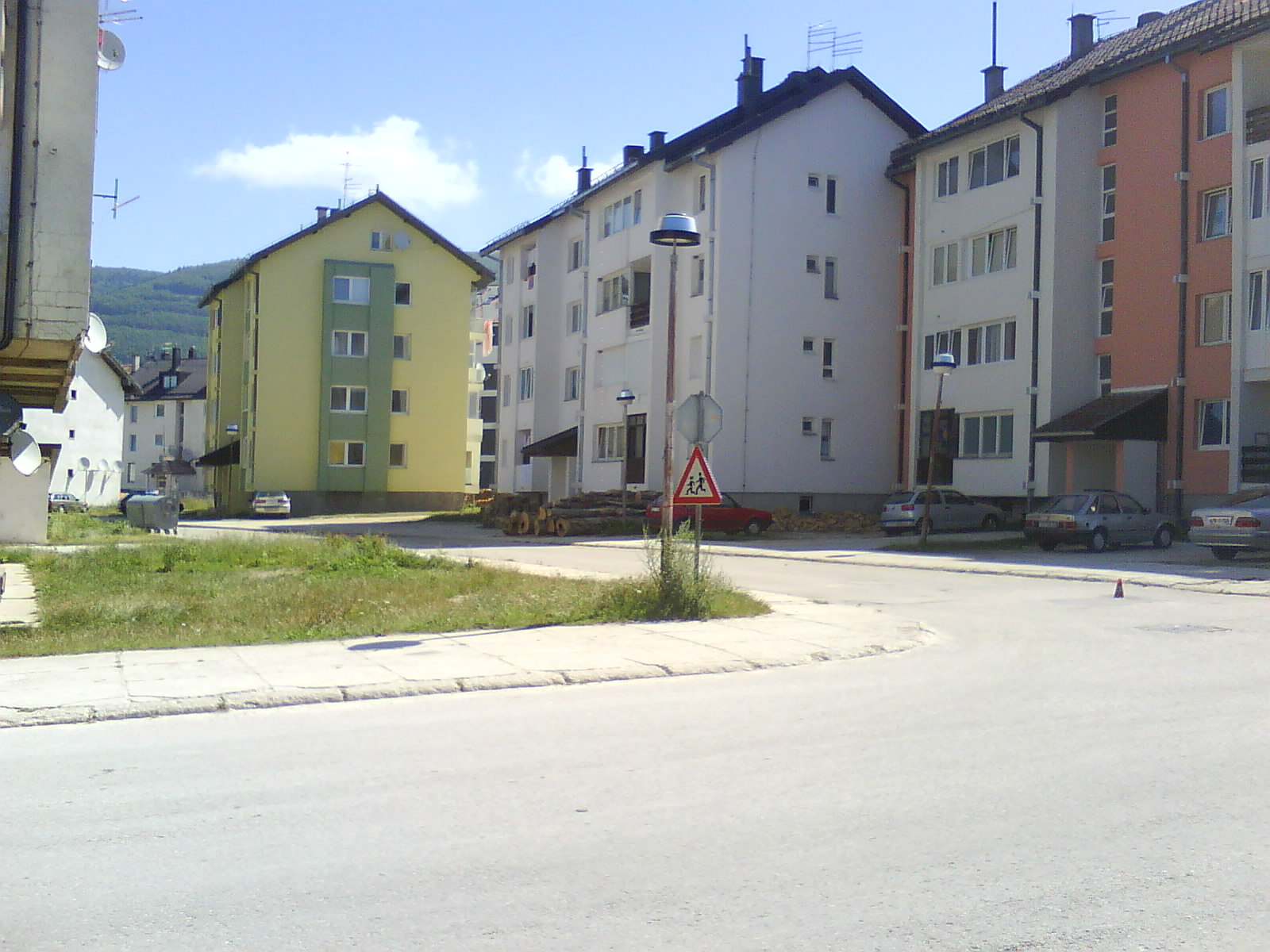 Kupres